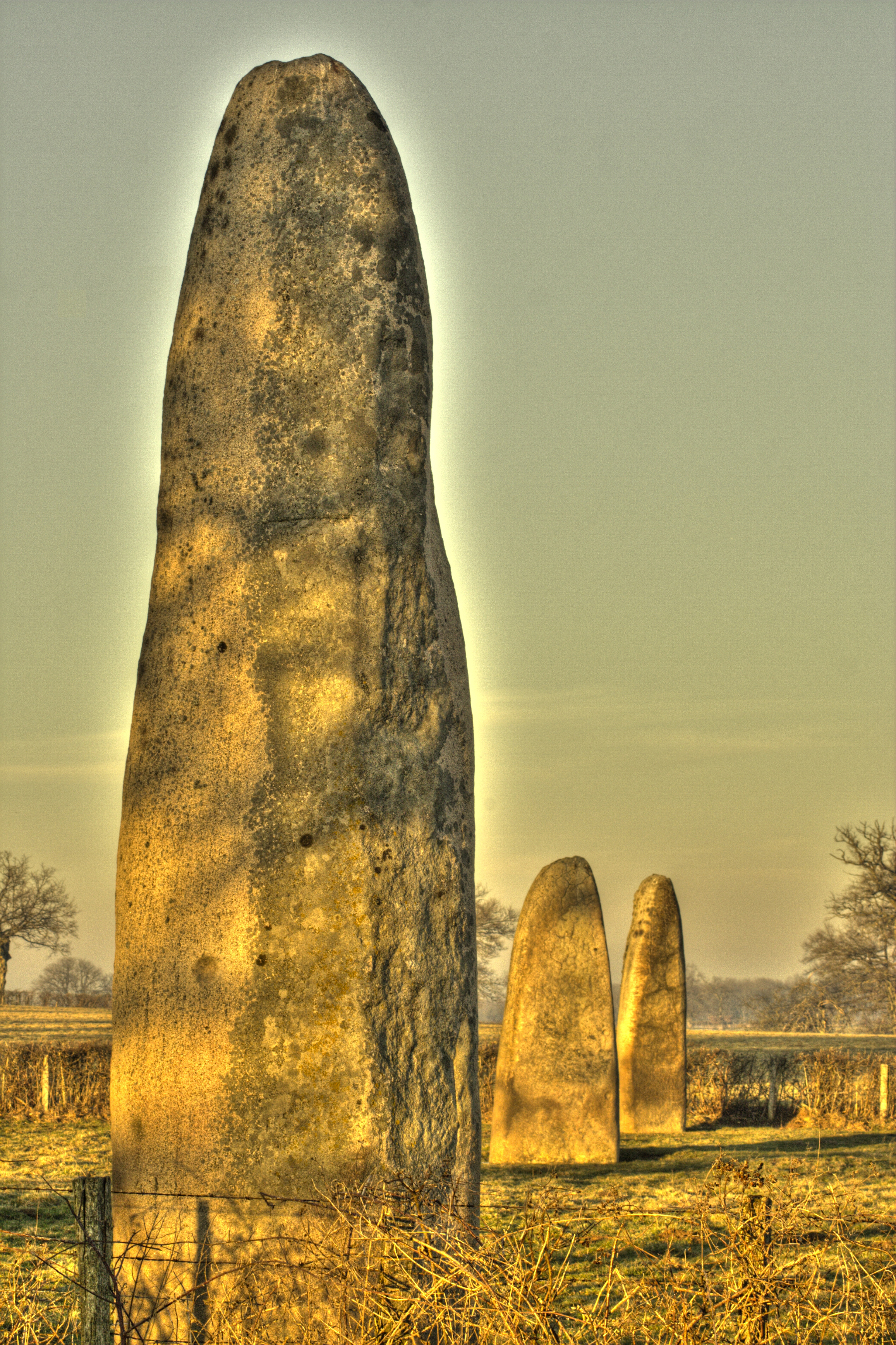 Menhir pres de Couches (Saône-et-Loire), dits Menhirs d'Époigny